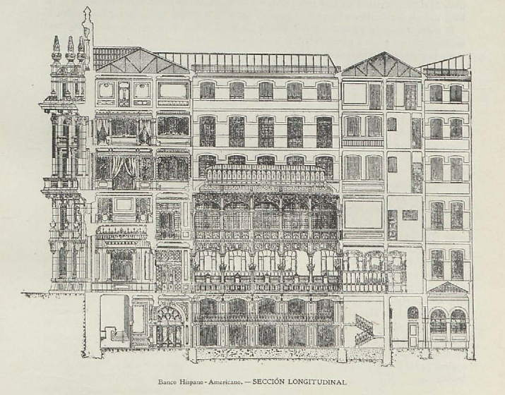 Sección longitudinal en el proyecto original del edificio del Banco Hispano-Americano